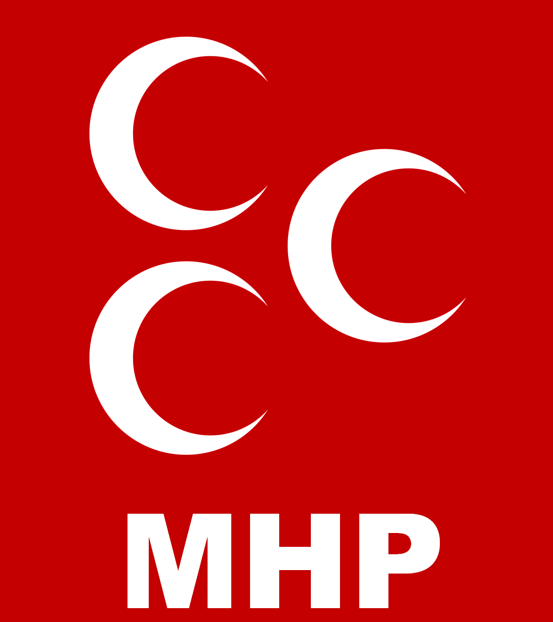 Milliyetçi Hareket Partisi amblemi